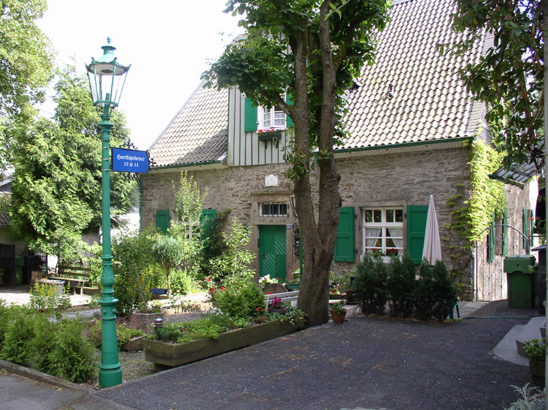 Hartkopsbever, Hückeswagen, 2004 selbst fotografiert, GFDL